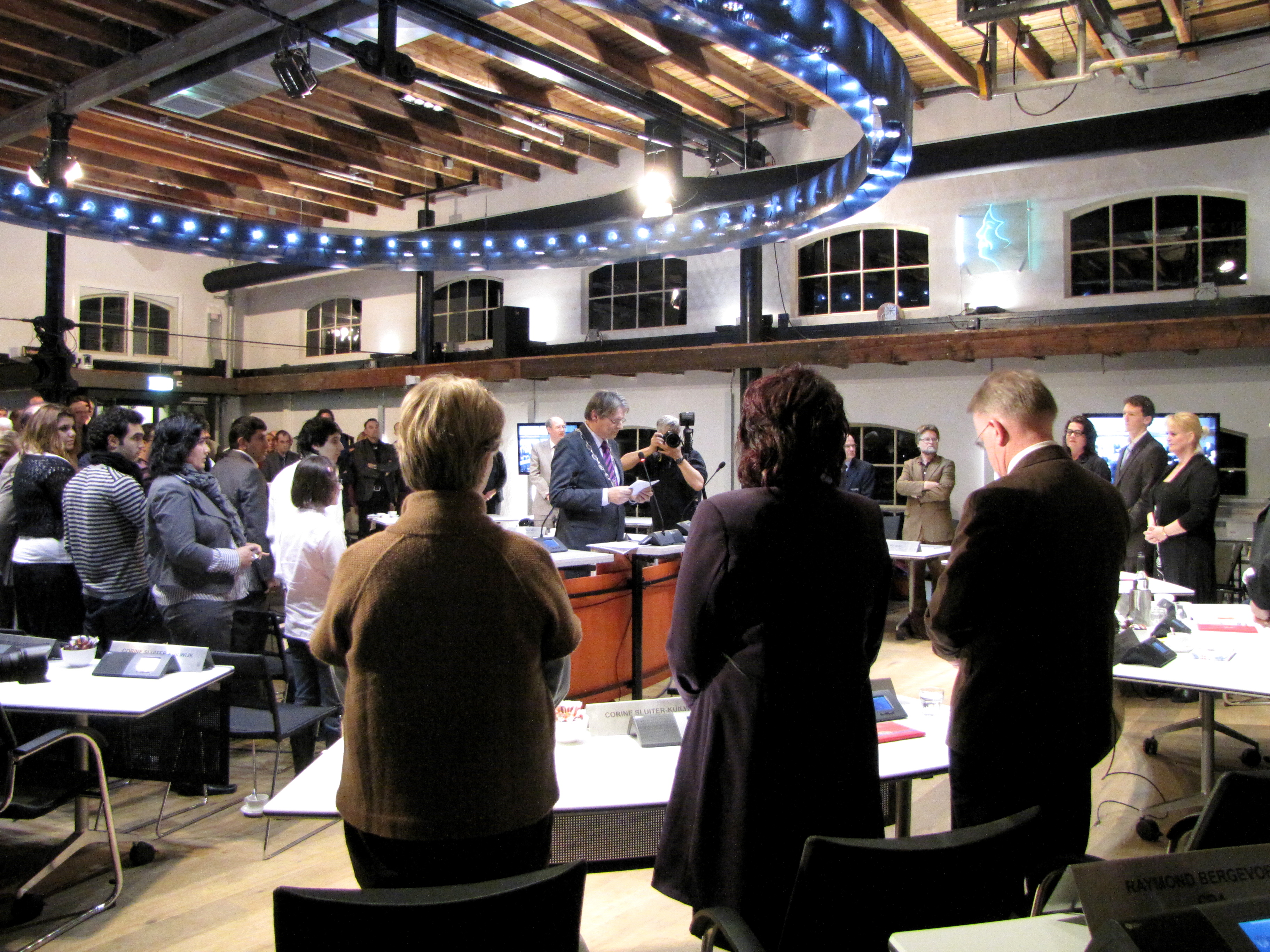 Beediging van de raadsleden, gemeente Oude IJsselstreek. Beeldmidden: burgmeester Hans Alberse.